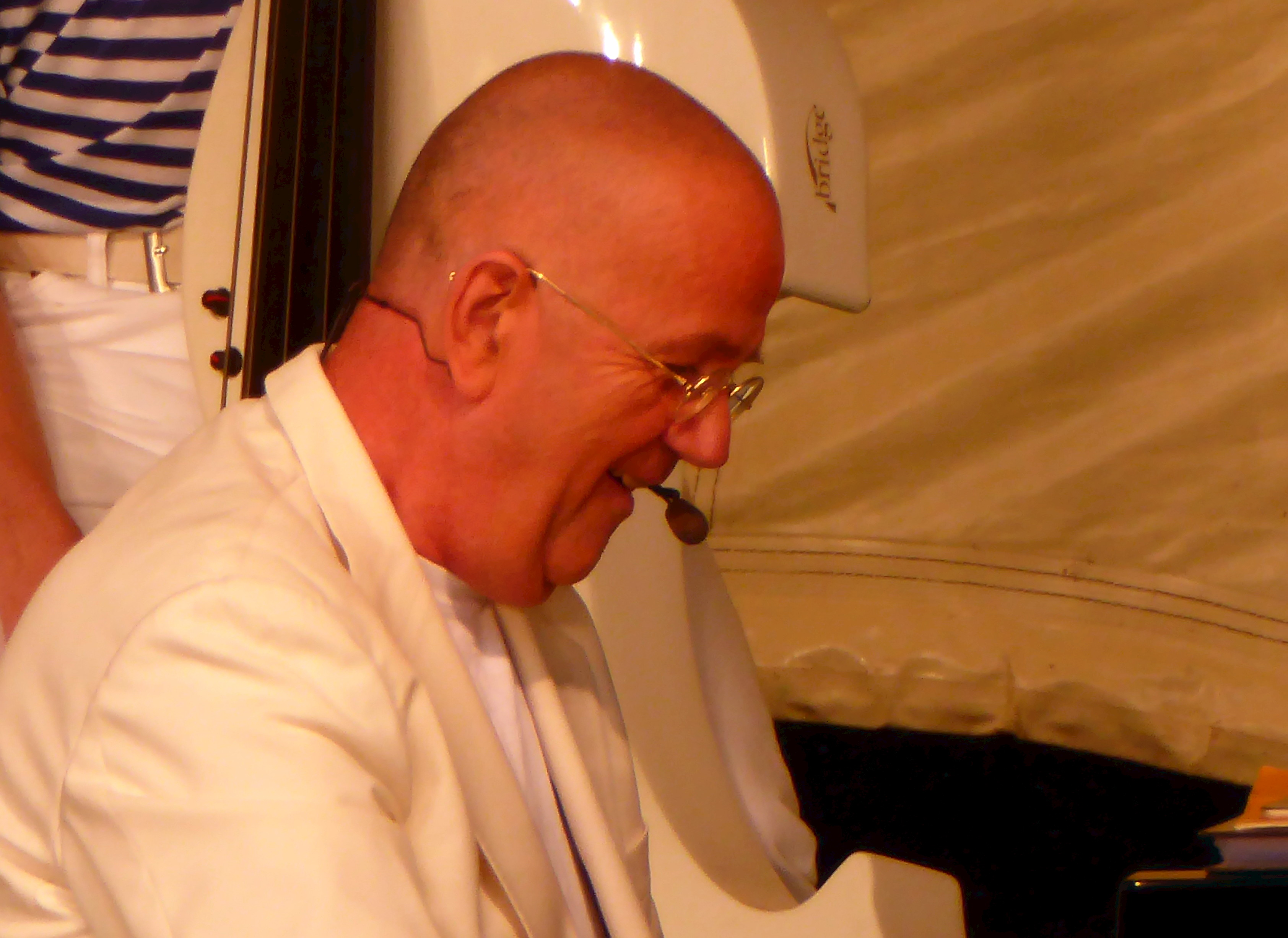 Hans Liberg in Eutin